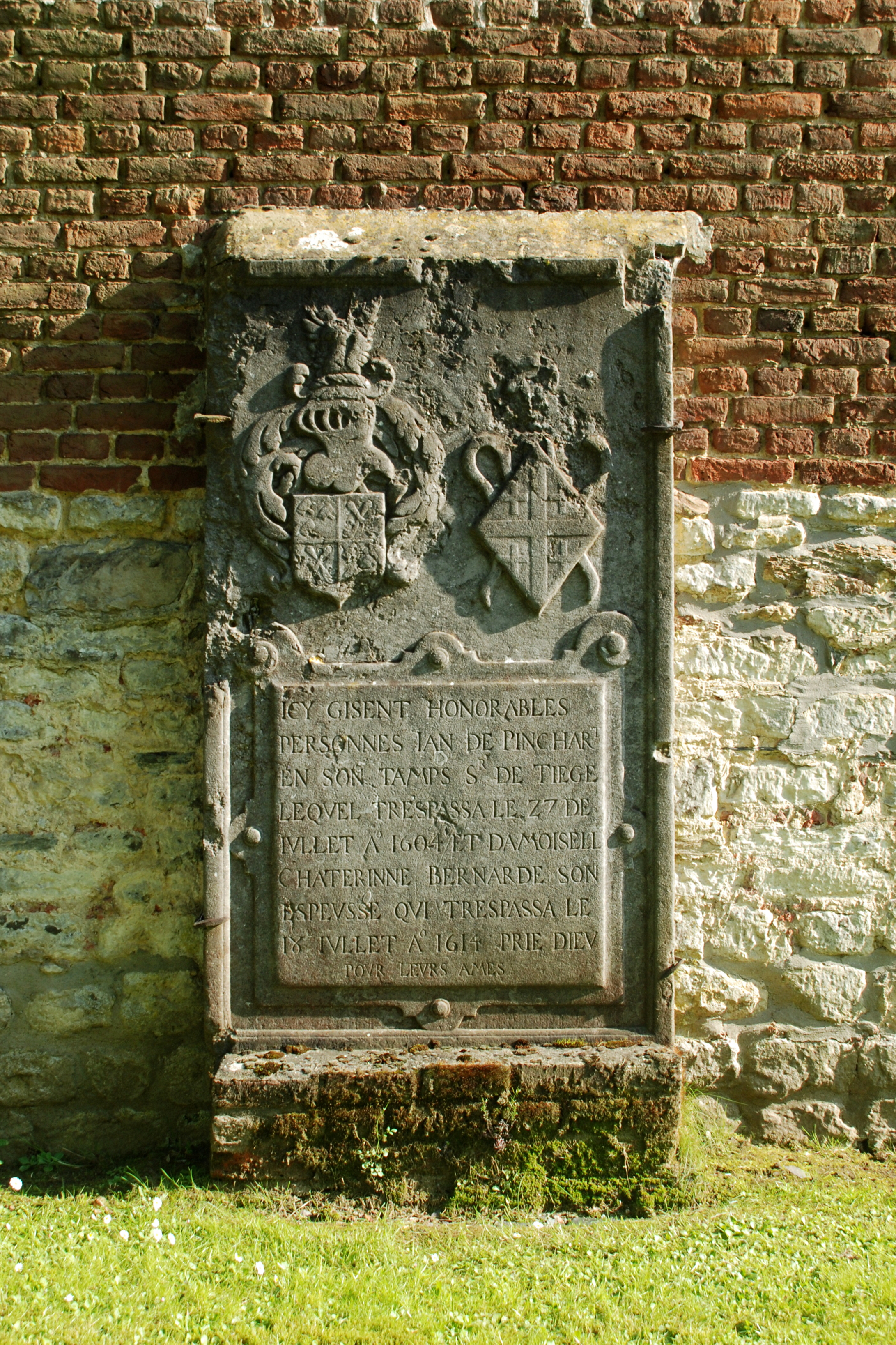 Belgique - Brabant wallon - Mont-Saint-Guibert - Église Saint-Pierre de Corbais - dalle funéraire de Jan de Pinchart (mort en 1604)